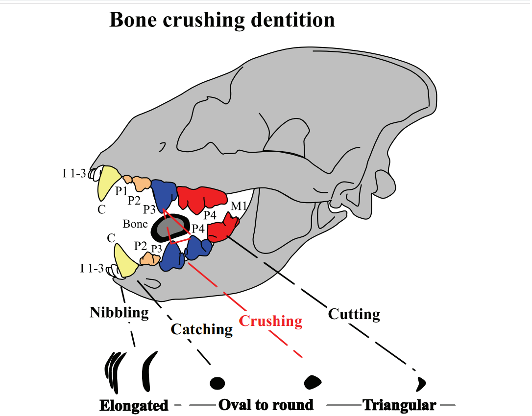 Skull and dentition of Crocuta crocuta spelaea